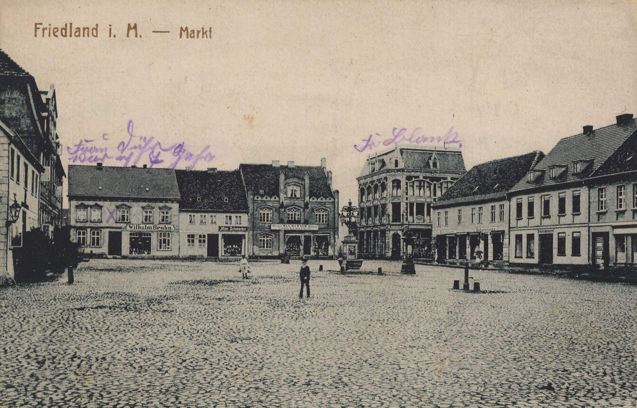 Marktplatz